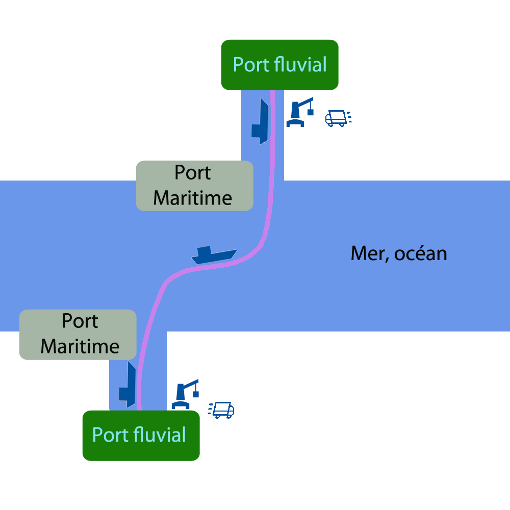 Un schéma qui représente une chaîne de transport intermodal à maillon fluvio-maritime